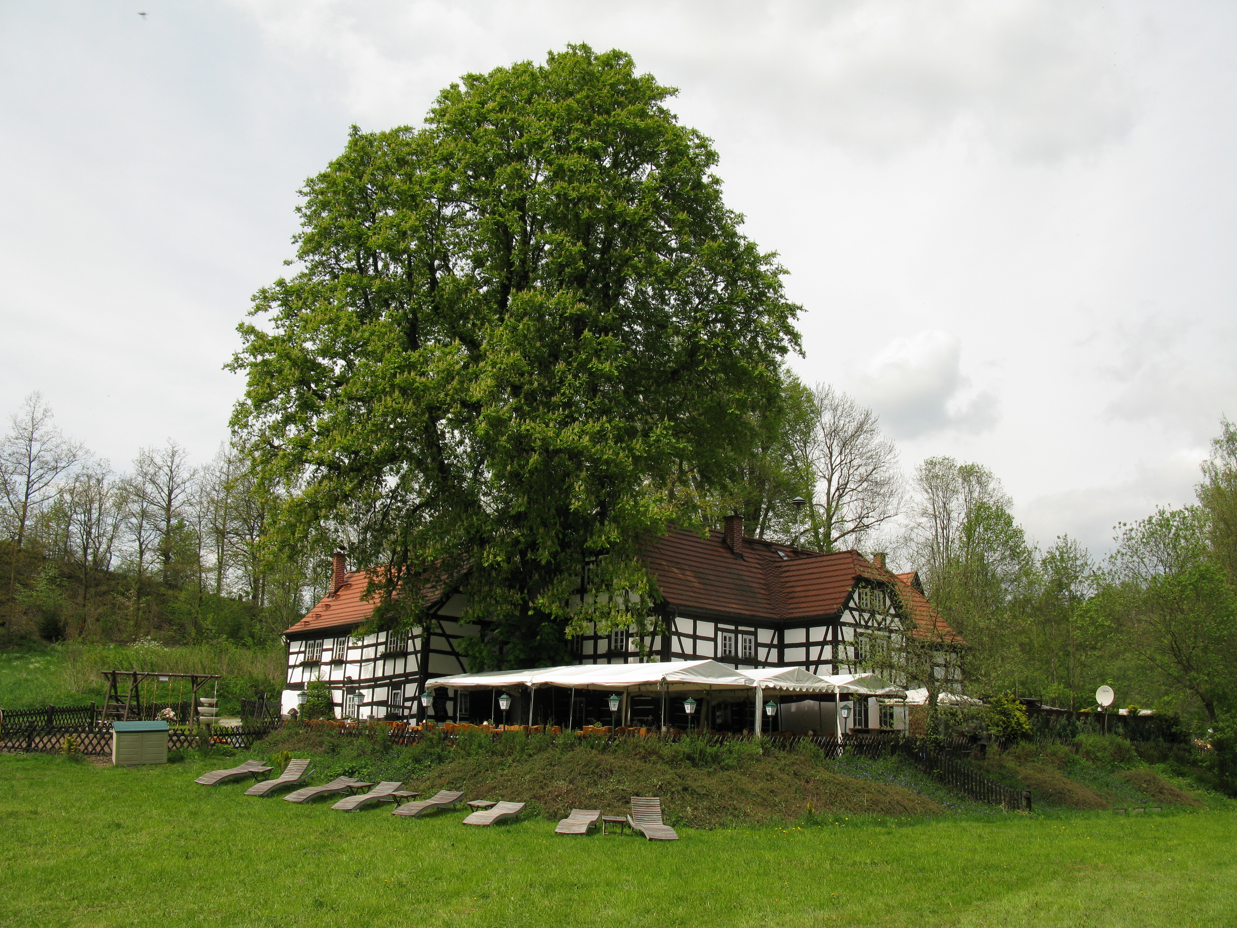 Der Lochbauernhof in Plauen, ein Dreiseithof von 1648